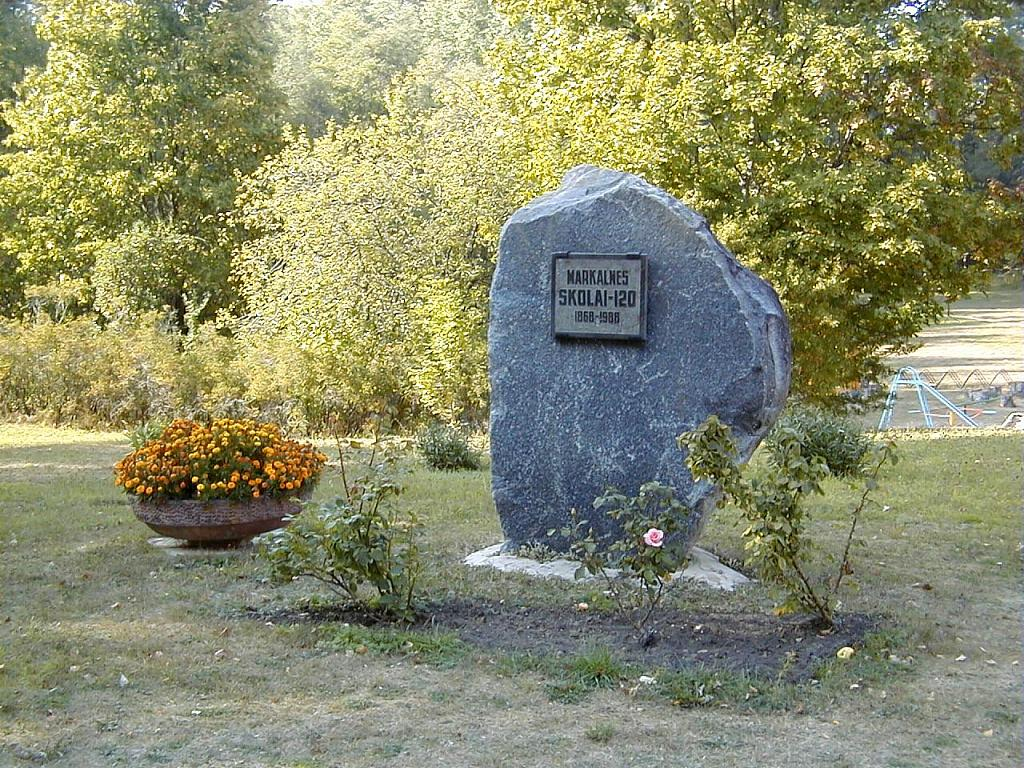 Mārkalnes skolas piemiņas zīme 2002-09-13